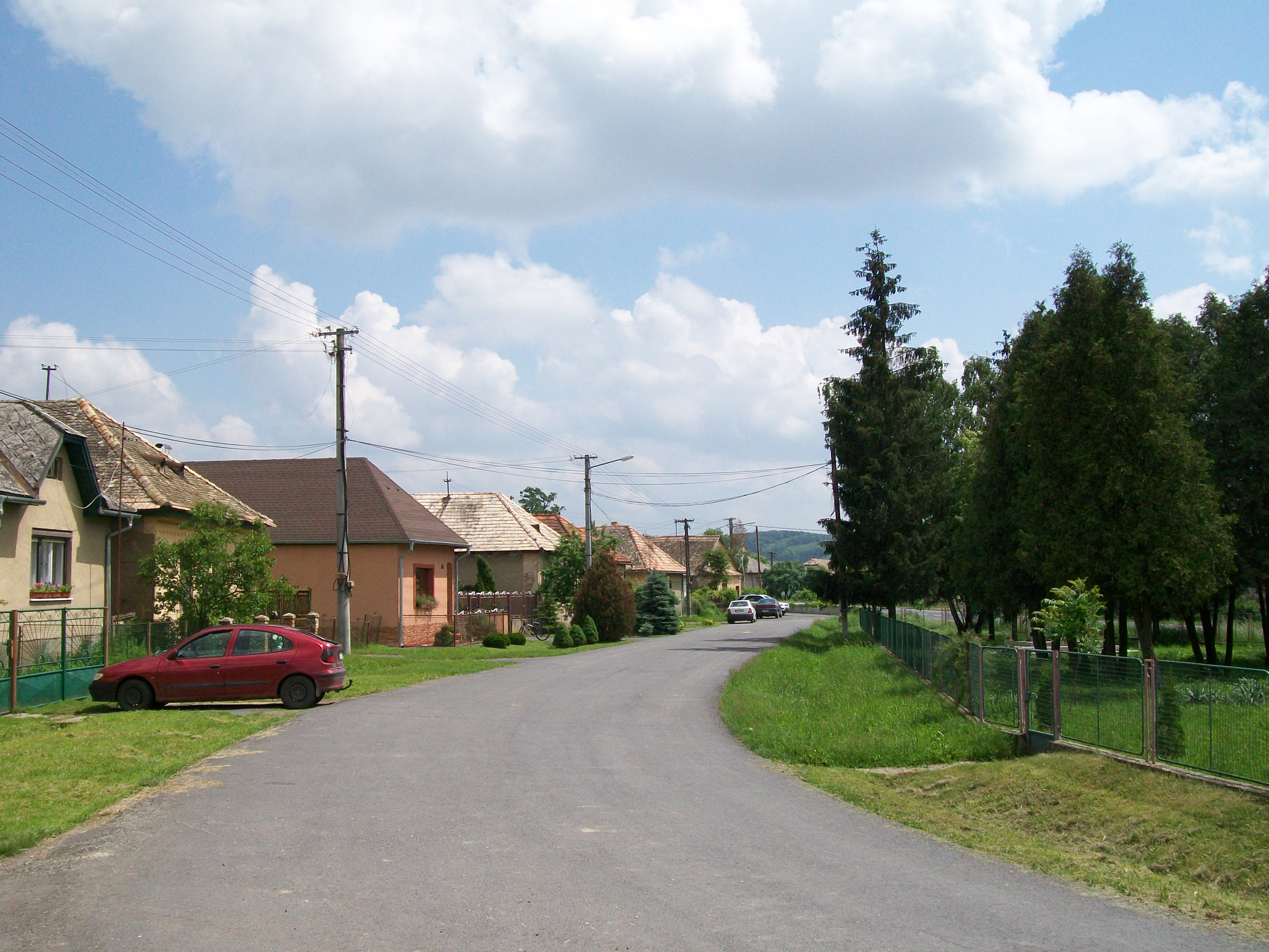 Kostolná ulica v Pincinej